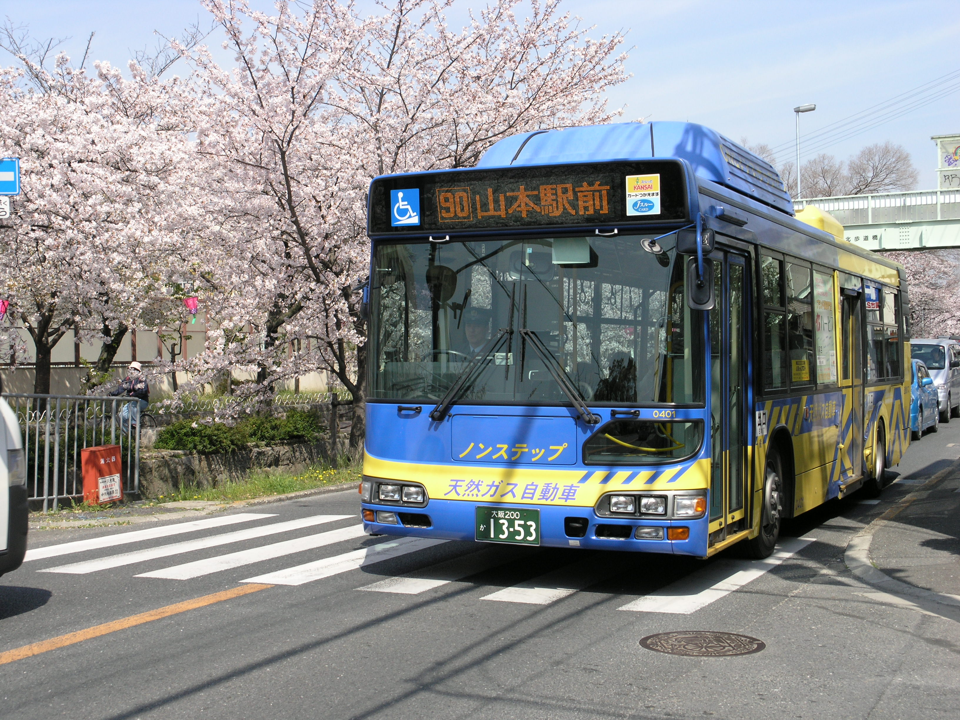 Kintetsu Bus in Yao City, Osaka, Japan